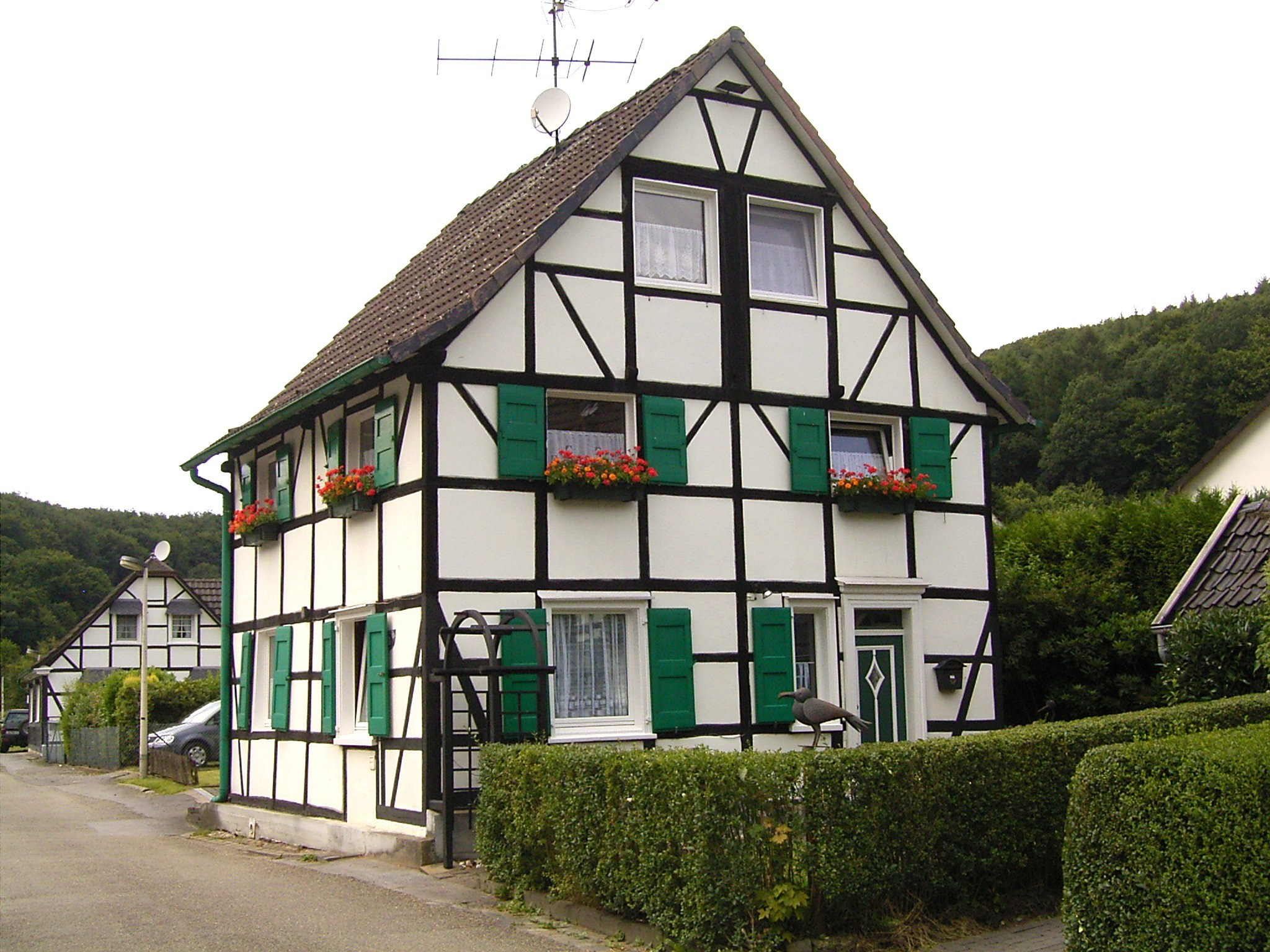 Solingen-Obenrüden